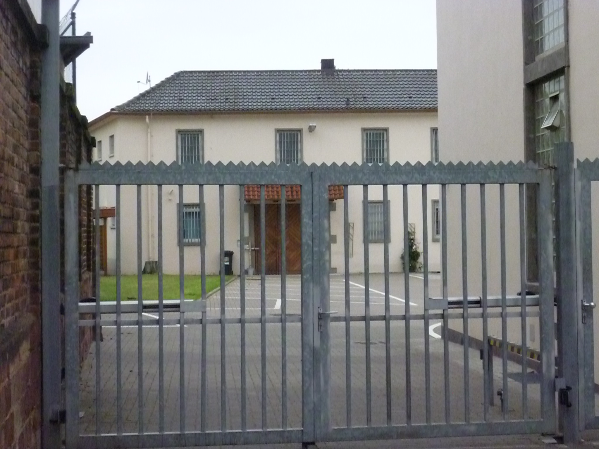 Ehemalige Justzvollzugsanstalt Neunkirchen